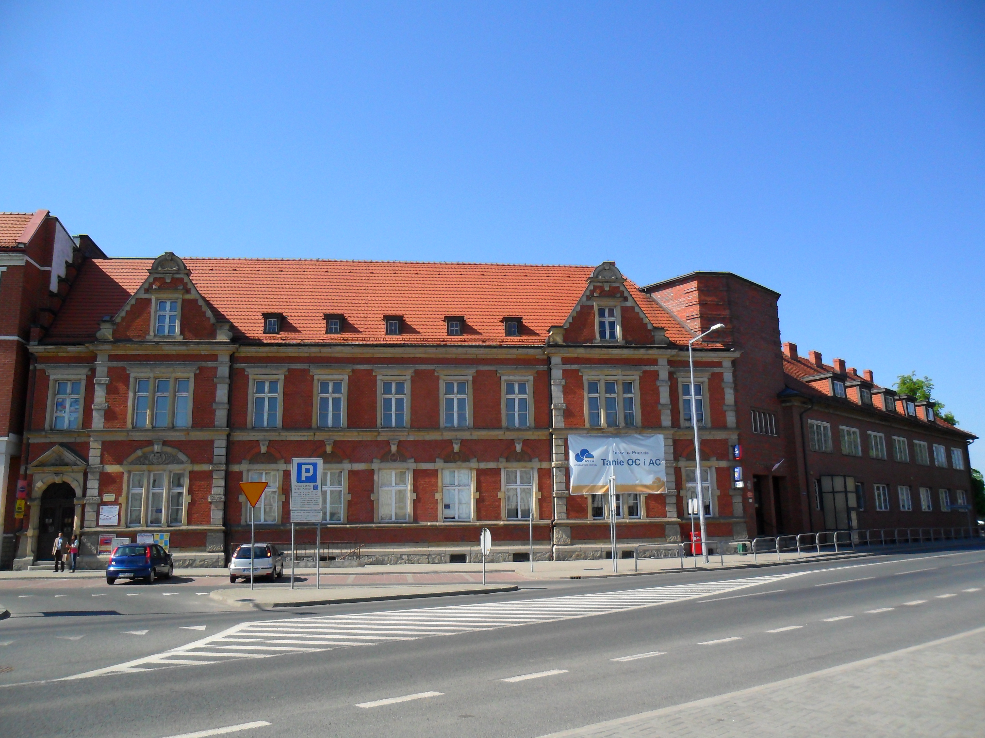 Budynek poczty w Raciborzu.